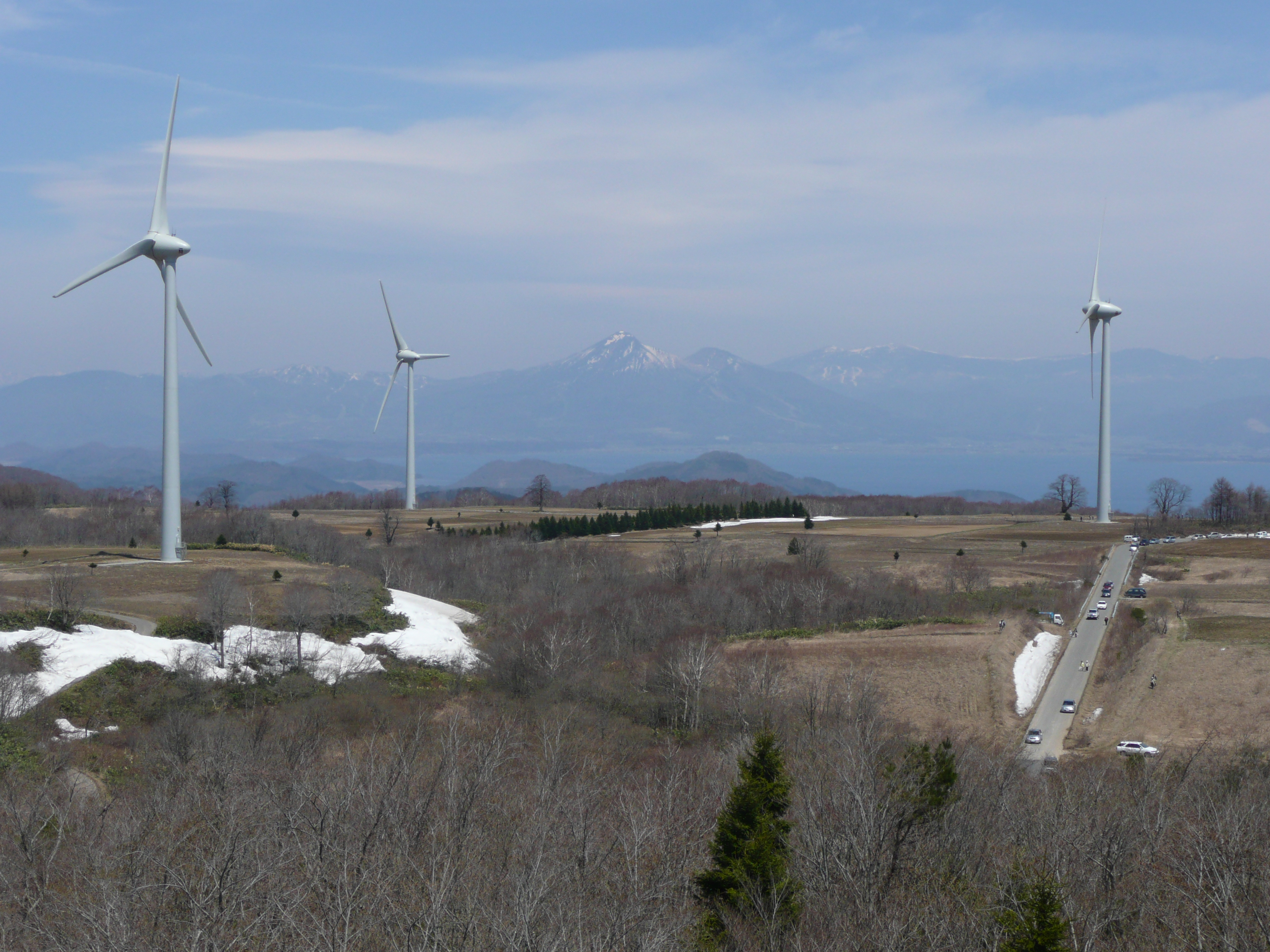 投稿者撮影、郡山布引風力発電所-北海道ja:美瑛町の風景を連想させるなだらかな起伏の田園風景、2007年4月撮影